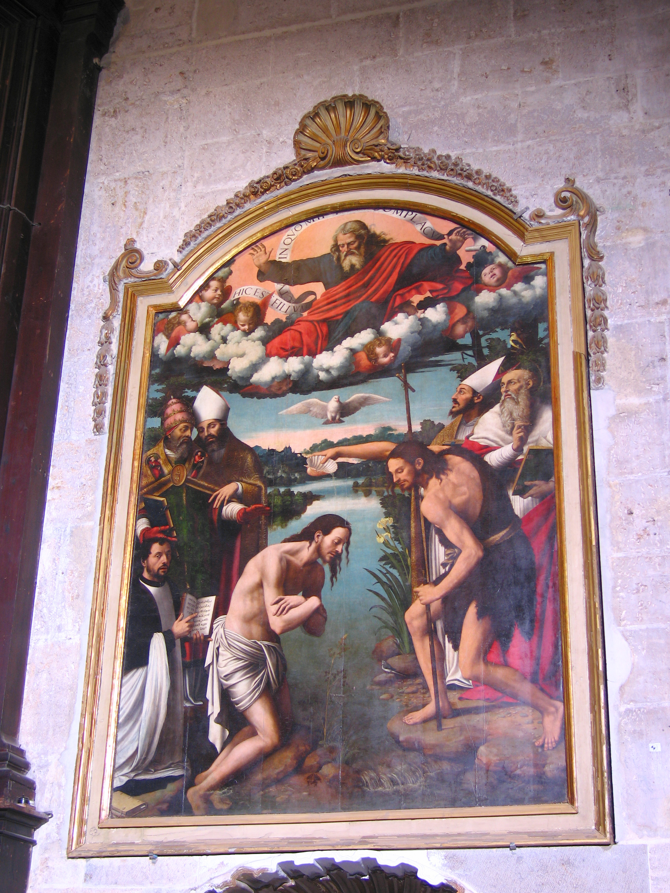 Quadre de Vicent Massip (Seu de València)